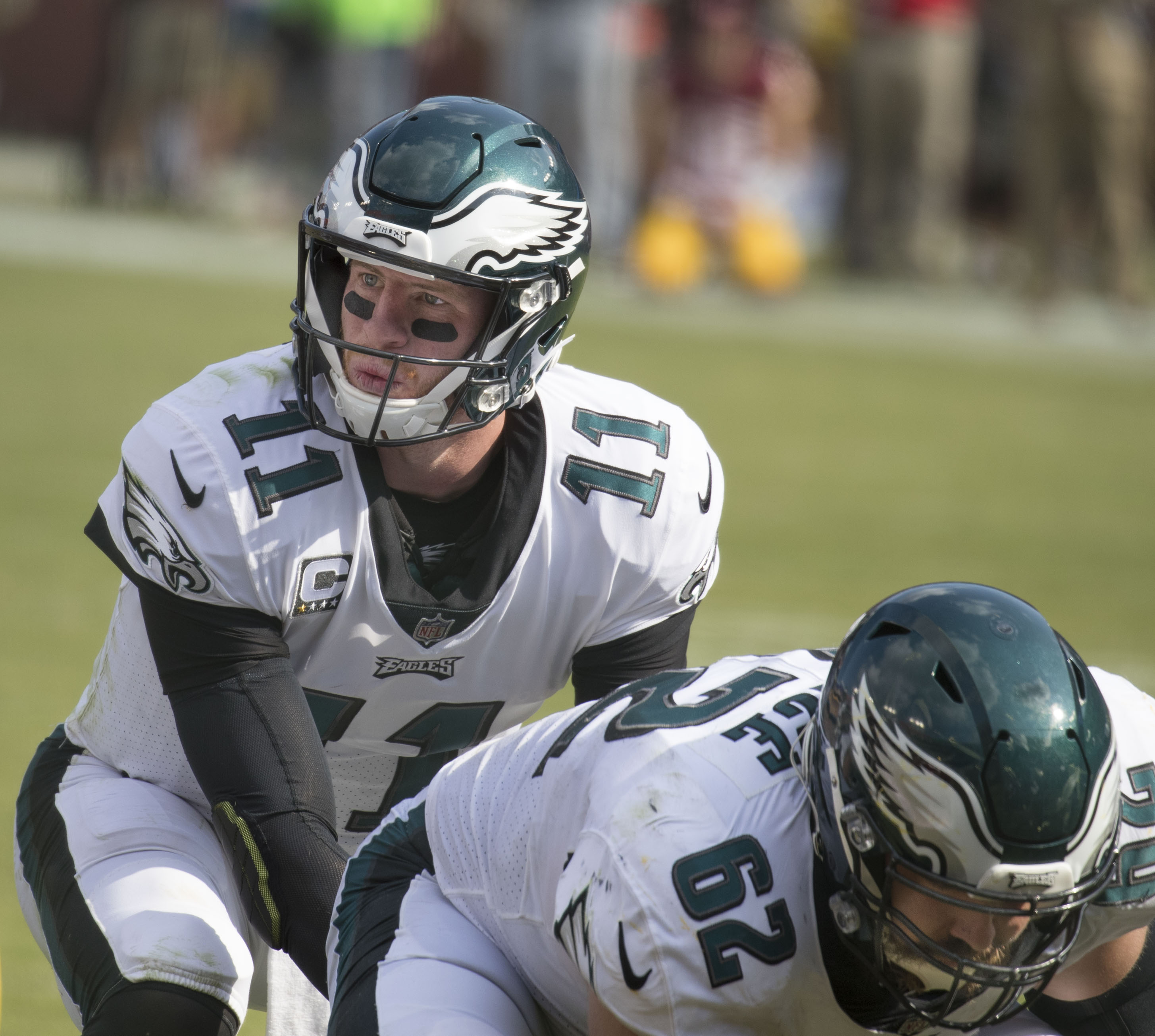 Eagles at Redskins 9/10/17